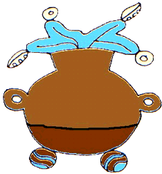 Glifo o escudo del municipio de Atotonilco el Grande